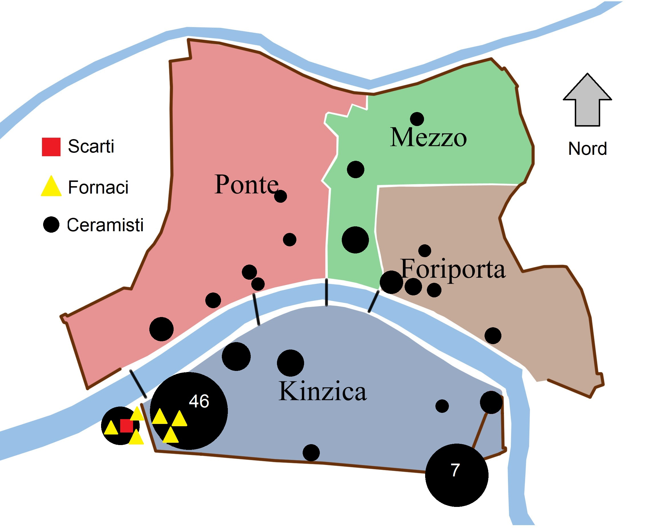 Mappa che mostra approssimativamente la presenza dei ceramisti e delle fornaci durante il XV secolo. Sono anche indicati i punti cittadini dove sono state rinvenute discariche di scarti di fornace o d'uso (La grandezza dei cerchi che indicano i ceramisti varia. In base a questa i cerchi indicano da 1 a 7 ceramisti, sopra i 7 viene esplicitato il numero).